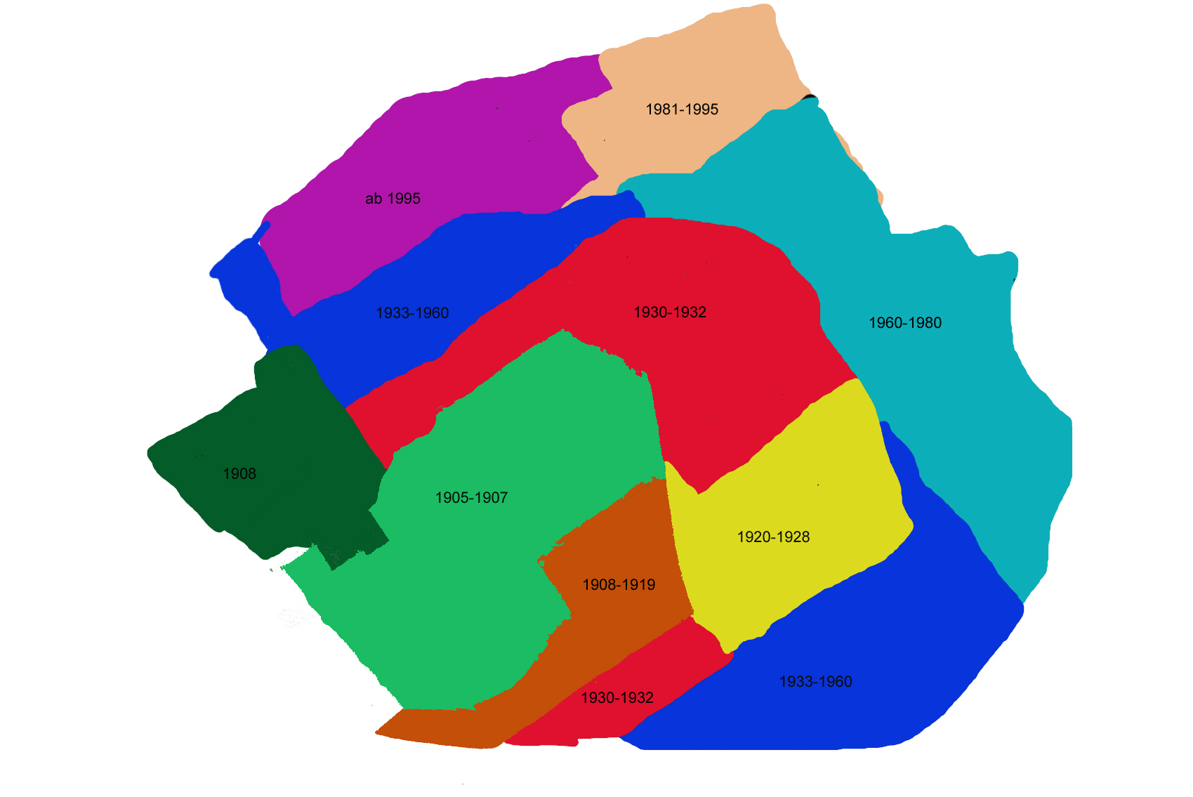 Ausbaustufen des kommunalen Südfriedhofes der Stadt Herne (ungefähr) 1904-2009